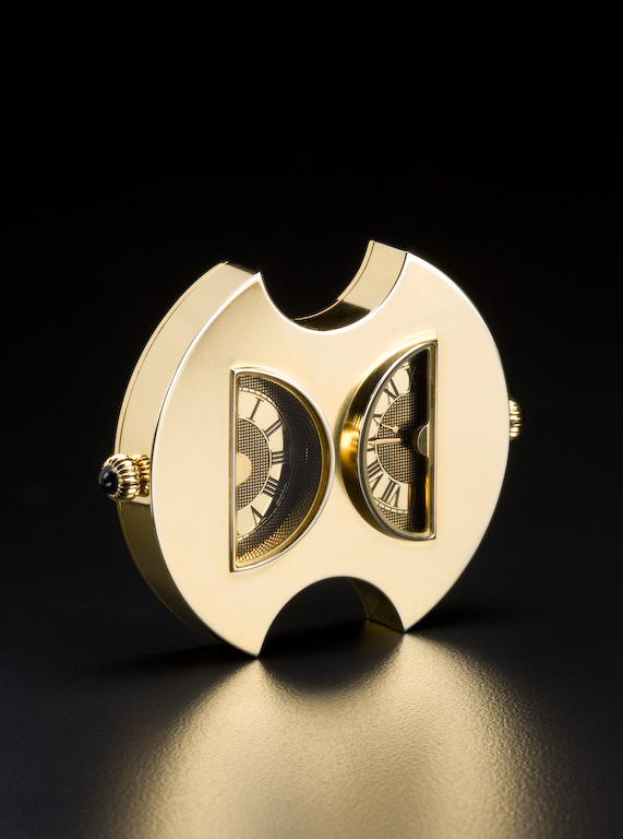 יצירה של איתי נוי